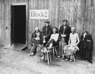 KZ-Häftlinge vor der Baracke 2 im Außenlager Hanover-Ahlem